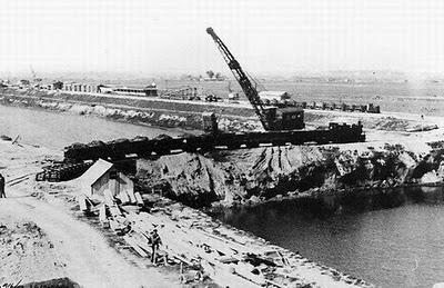 Obras de rectificación del Riachuelo, límite natural entre la ciudad de Buenos Aires y la provincia del mismo nombre, Argentina.